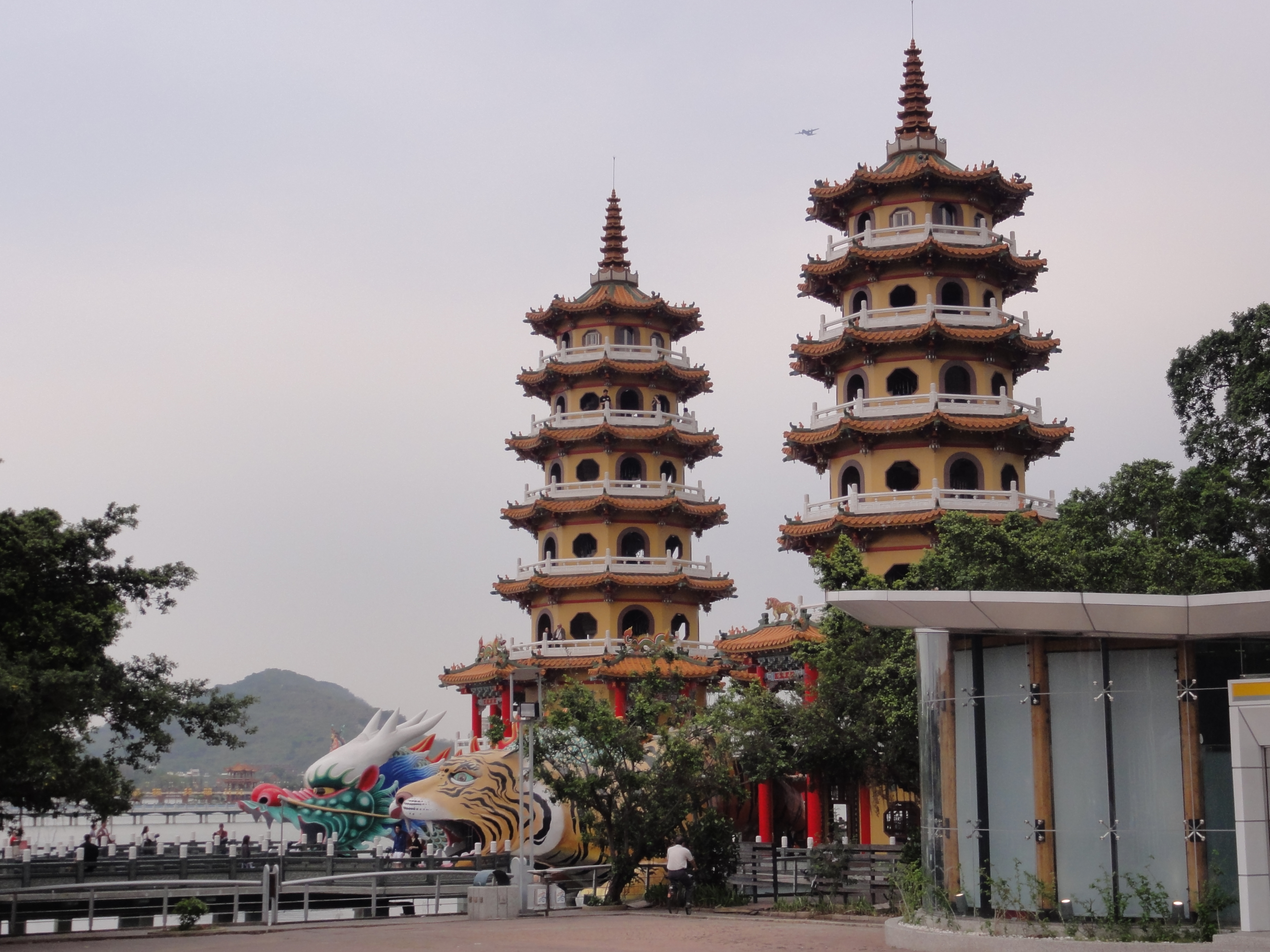 Gaoxiong Zuoying Lianchitan Longhuta蓮池潭 龍虎塔